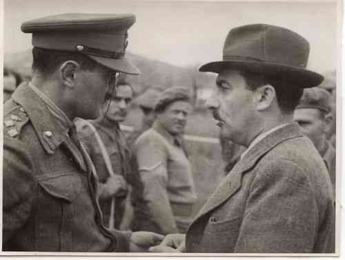 ביקור אצל חיילי הבריגדה Visiting Jewish Brigade troops, Italy: Brigadier Benjamin, Moshe Sharett משה שרת/ בריגדיר בנימין איטליה 10